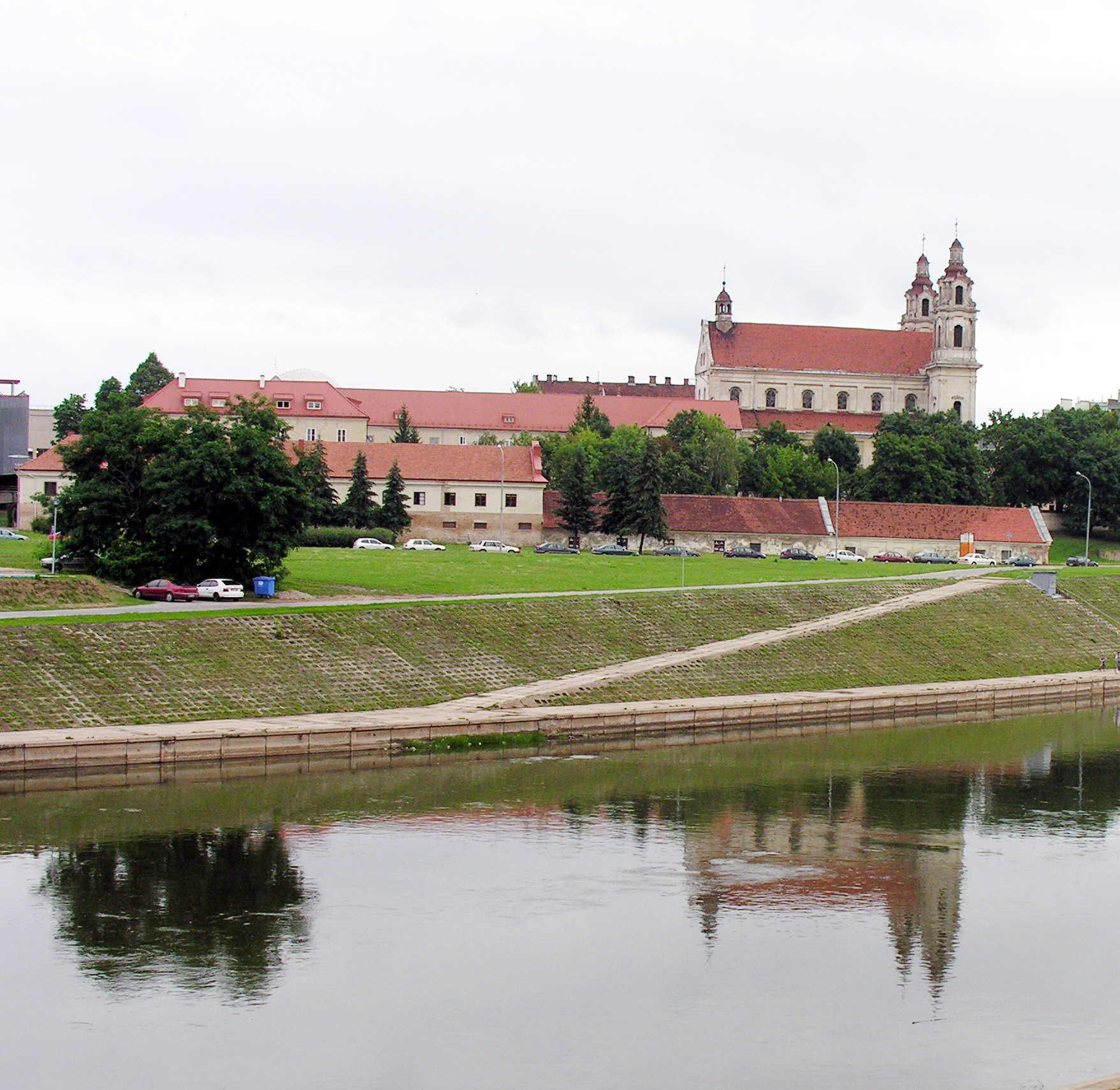 Vilniaus Šv. Rapolo bažnyčios ir jėzuitų vienuolyno ansamblis Foto: Algirdas, 2006 m. rugpjūčio 8 d., Lietuva